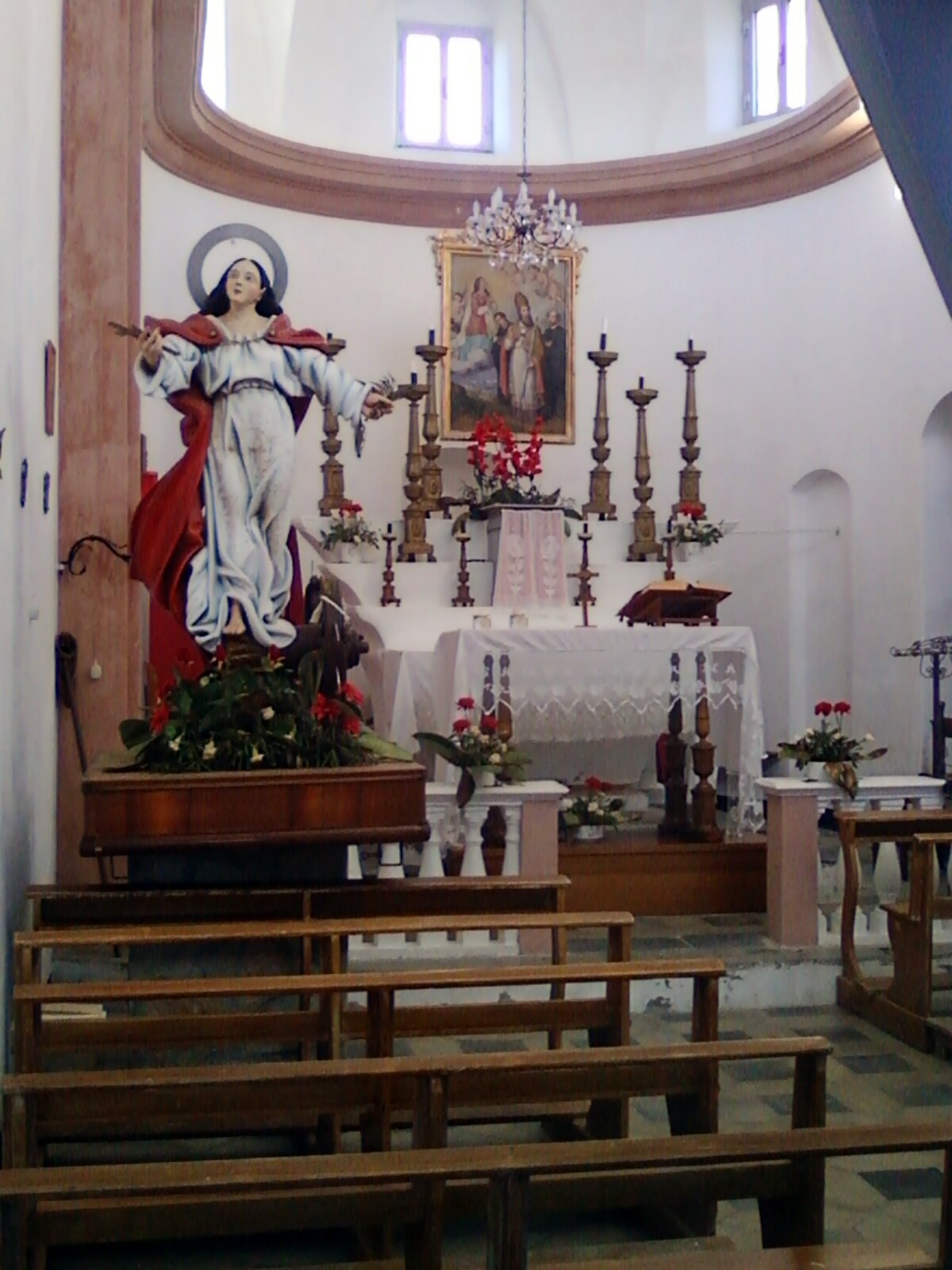 Cappella di Santa Caterina nella frazione di Casanova in Varazze (Italy)